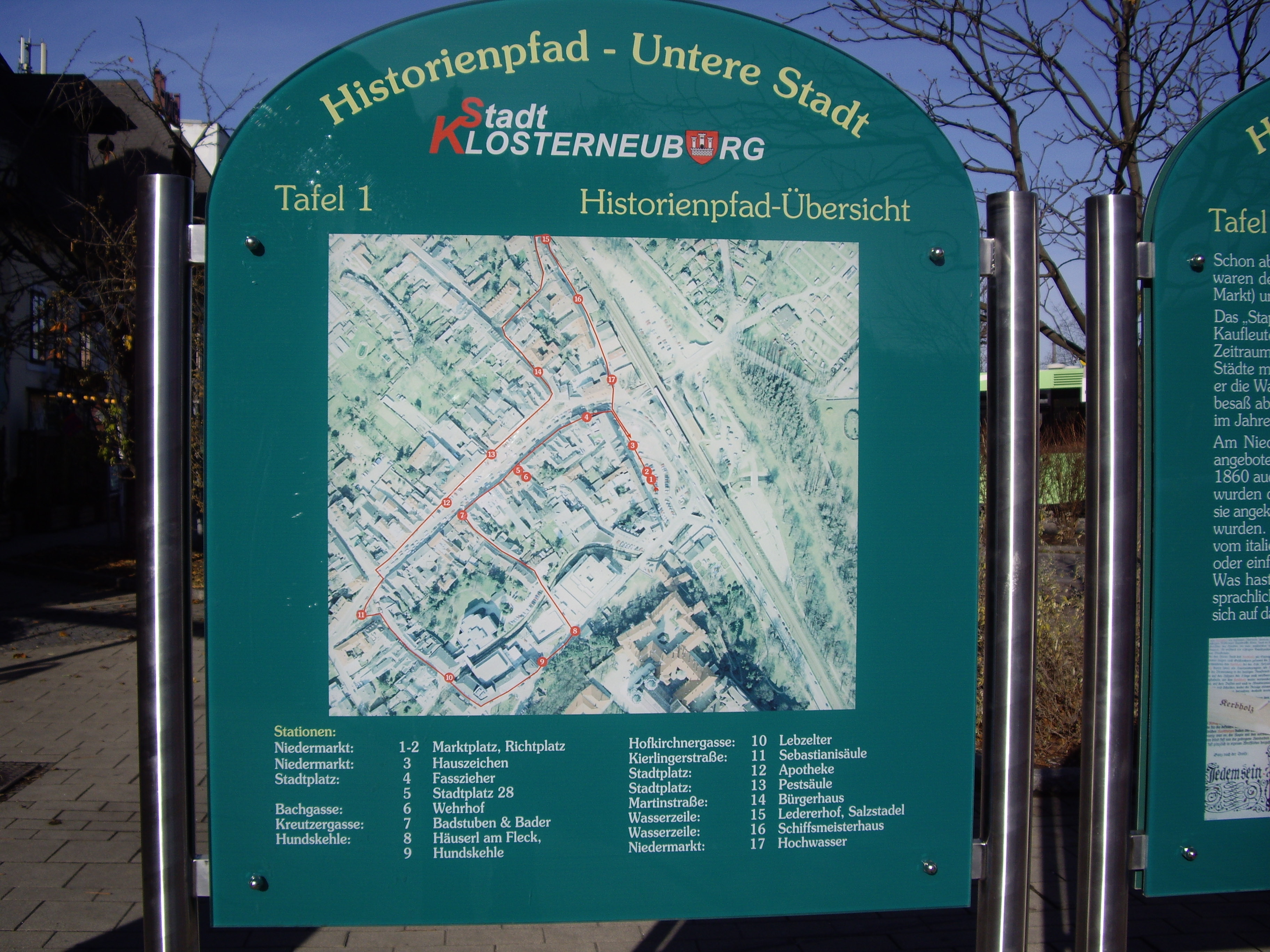 Unua tabulo de 17 de la Historiojpado en Malsupra Urbo de Klostronovburgo Urbo.